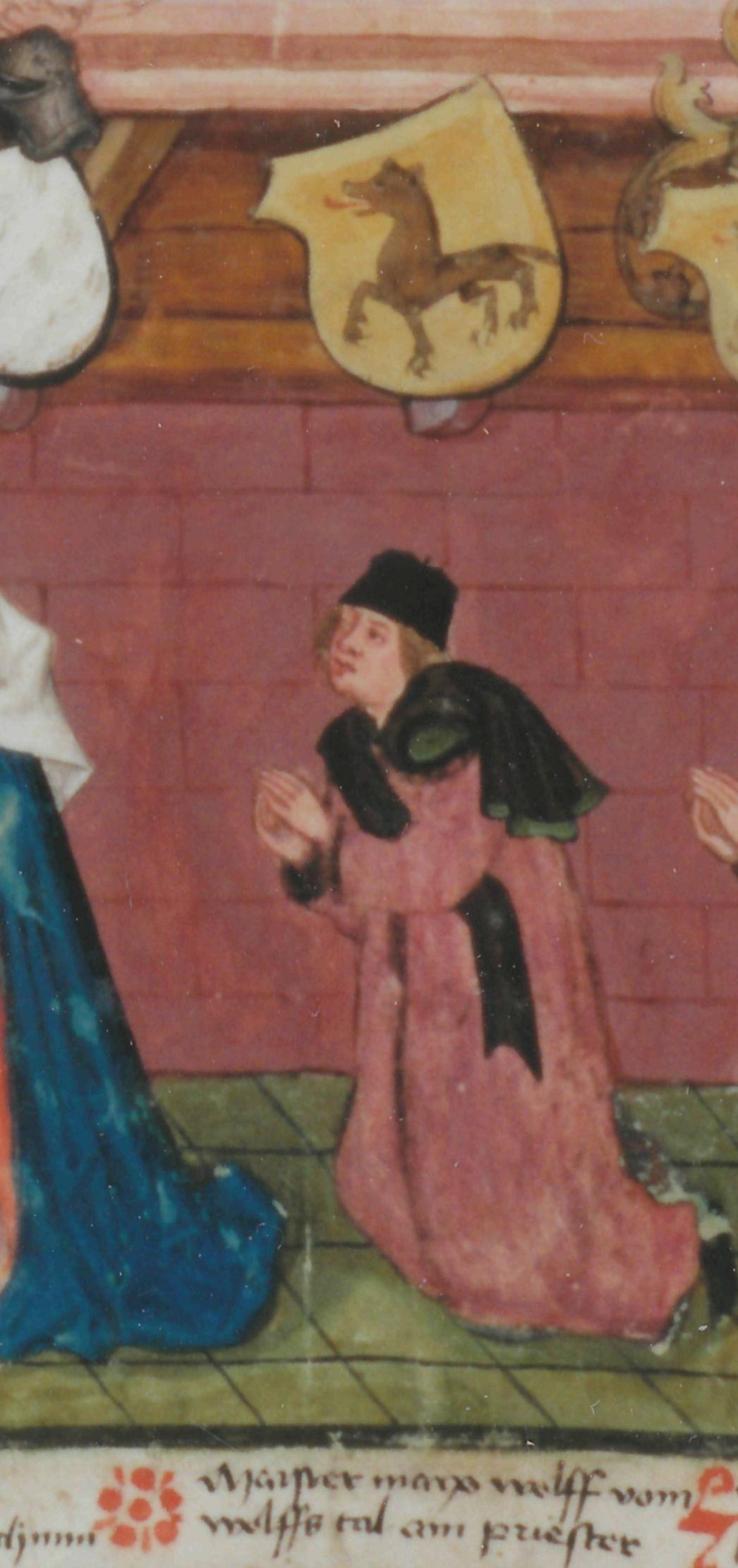 Priester Marcus Wolf (Schwäbisch Gmünd) mit Wappen. Er war ein Kunde von Johannes Richenbach.